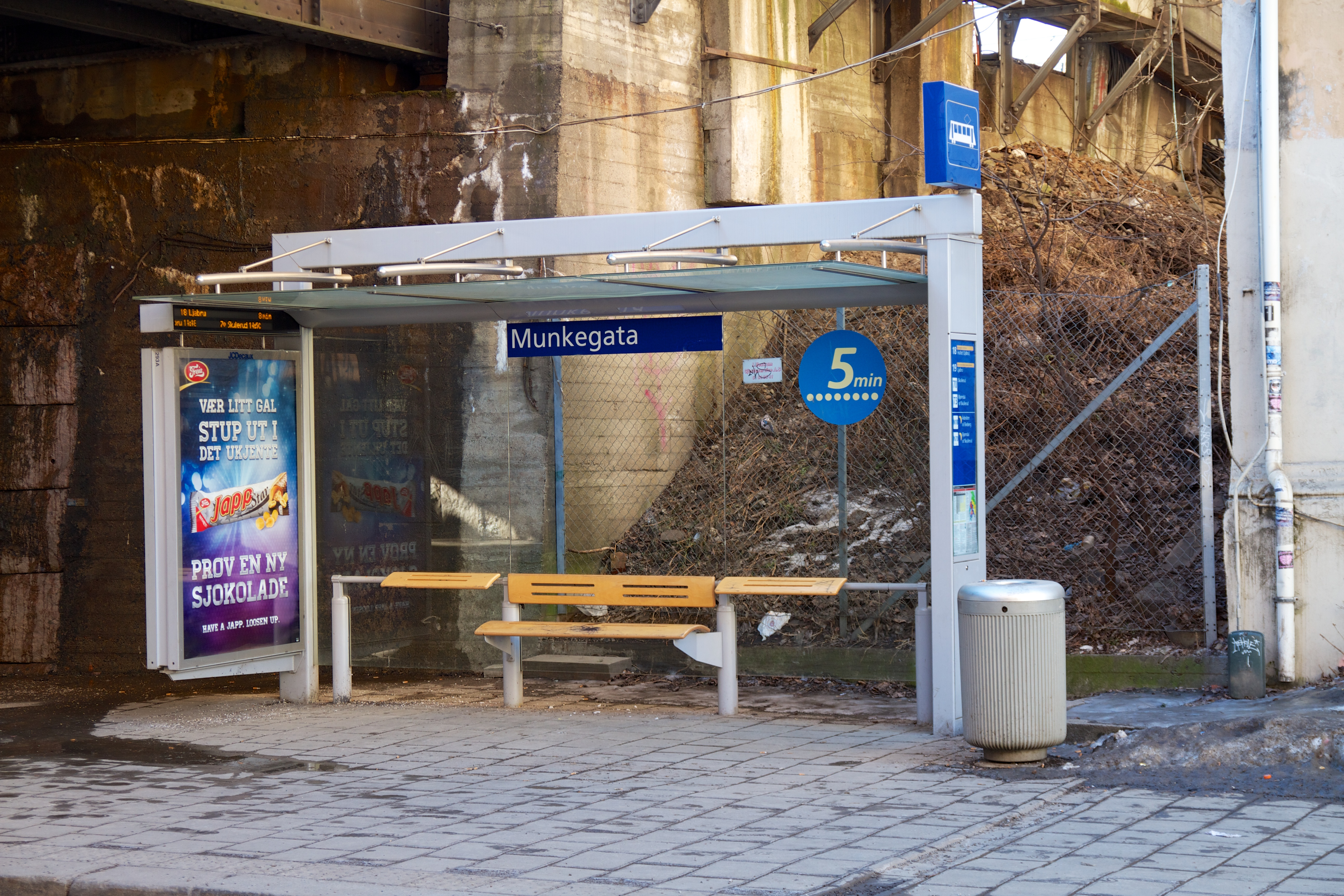 Munkegata holdeplass